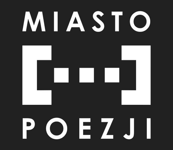 logotyp festiwalu Miasto Poezji